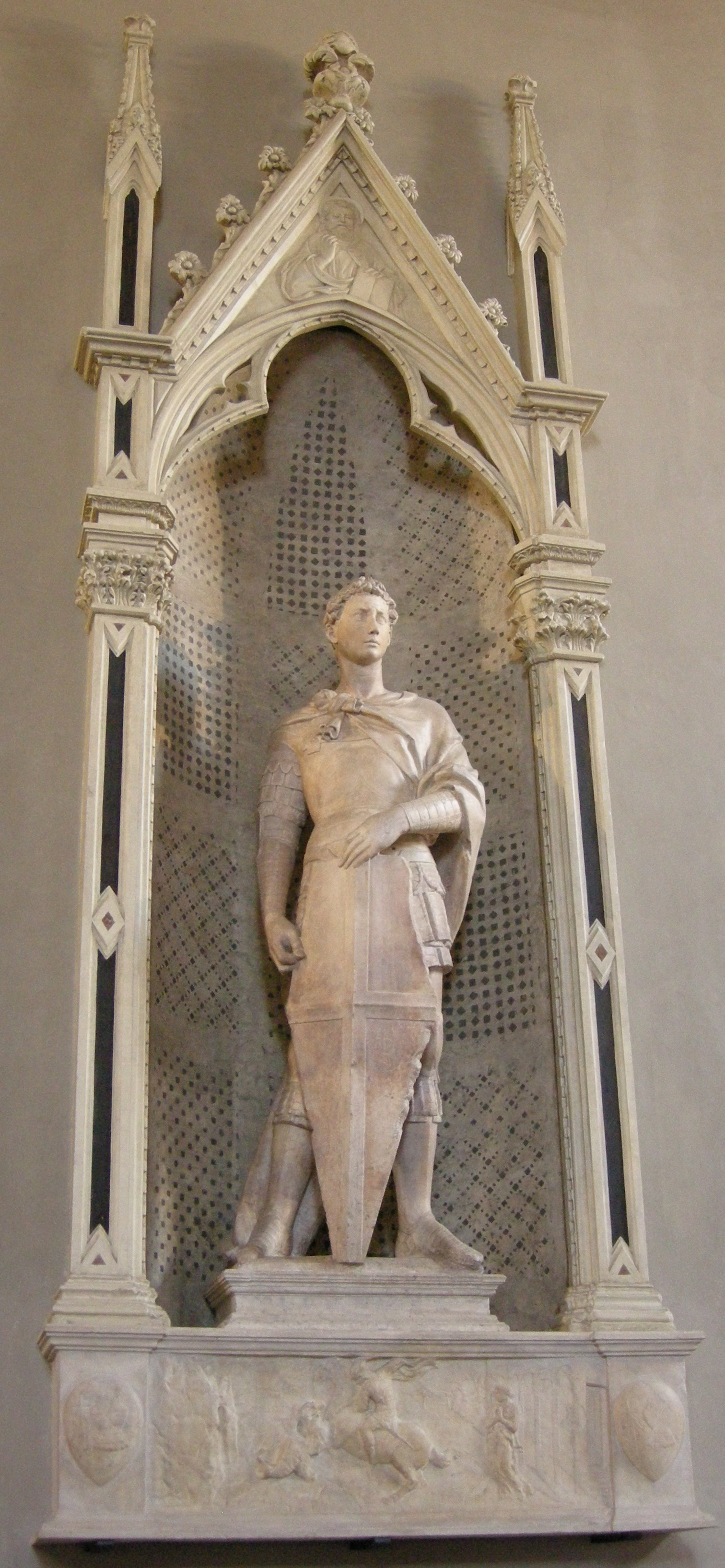 Donatello, san giorgio